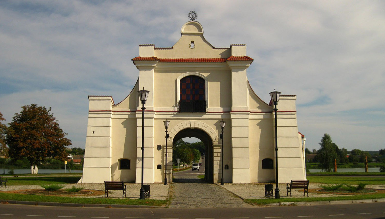 Беларуская (тарашкевіца): Гарадзкая Слуцкая брама. г. Нясьвіж This is a photo of Belarusian heritage monument. Reference number: 611Г000476 ( WLM)